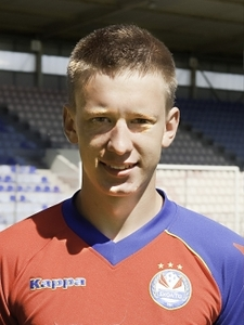 Andrejs Siņicins Skonto FC sastāvā 2012. gads